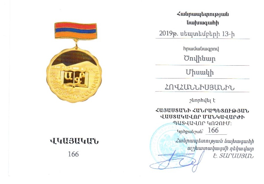 ՀՀ «Վաստակավոր մանկավարժ» կոչման վկայական։ Տրված է 2019 թ․ պրոֆեսոր Ծ․ Հովհաննիսյանին ՀՀ նախագահ Ա․ Սարգսյանի հրամանագրով։